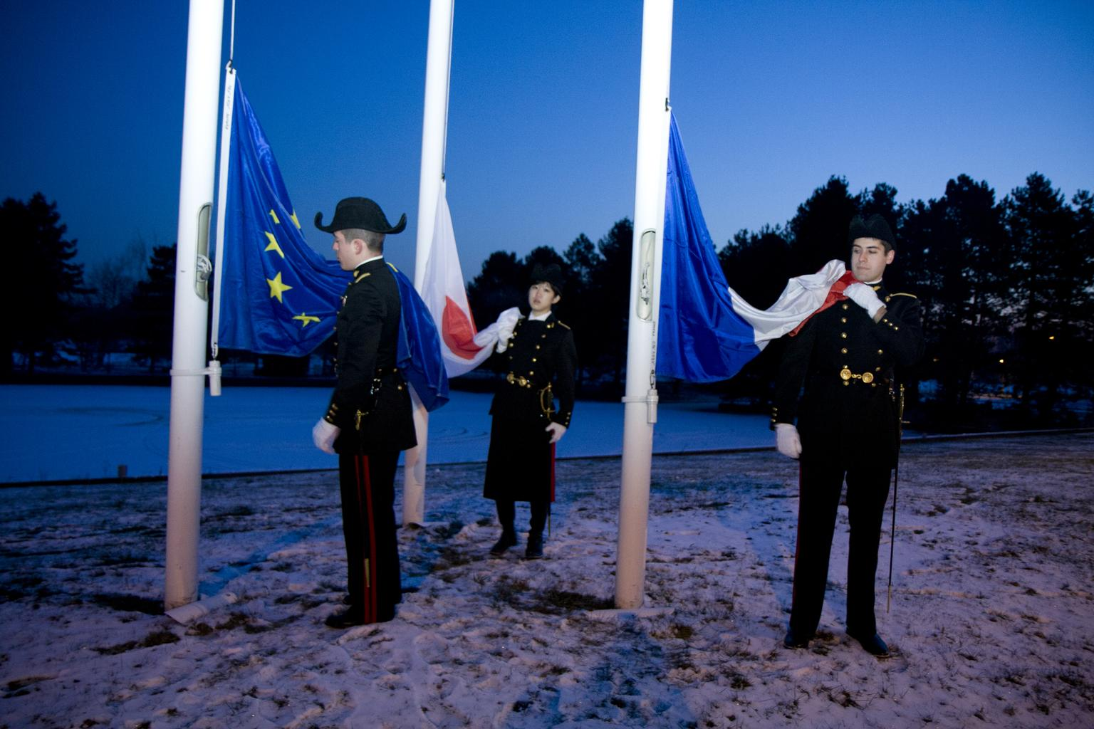 Photo de la cérémonie des couleurs à l'École polytechnique